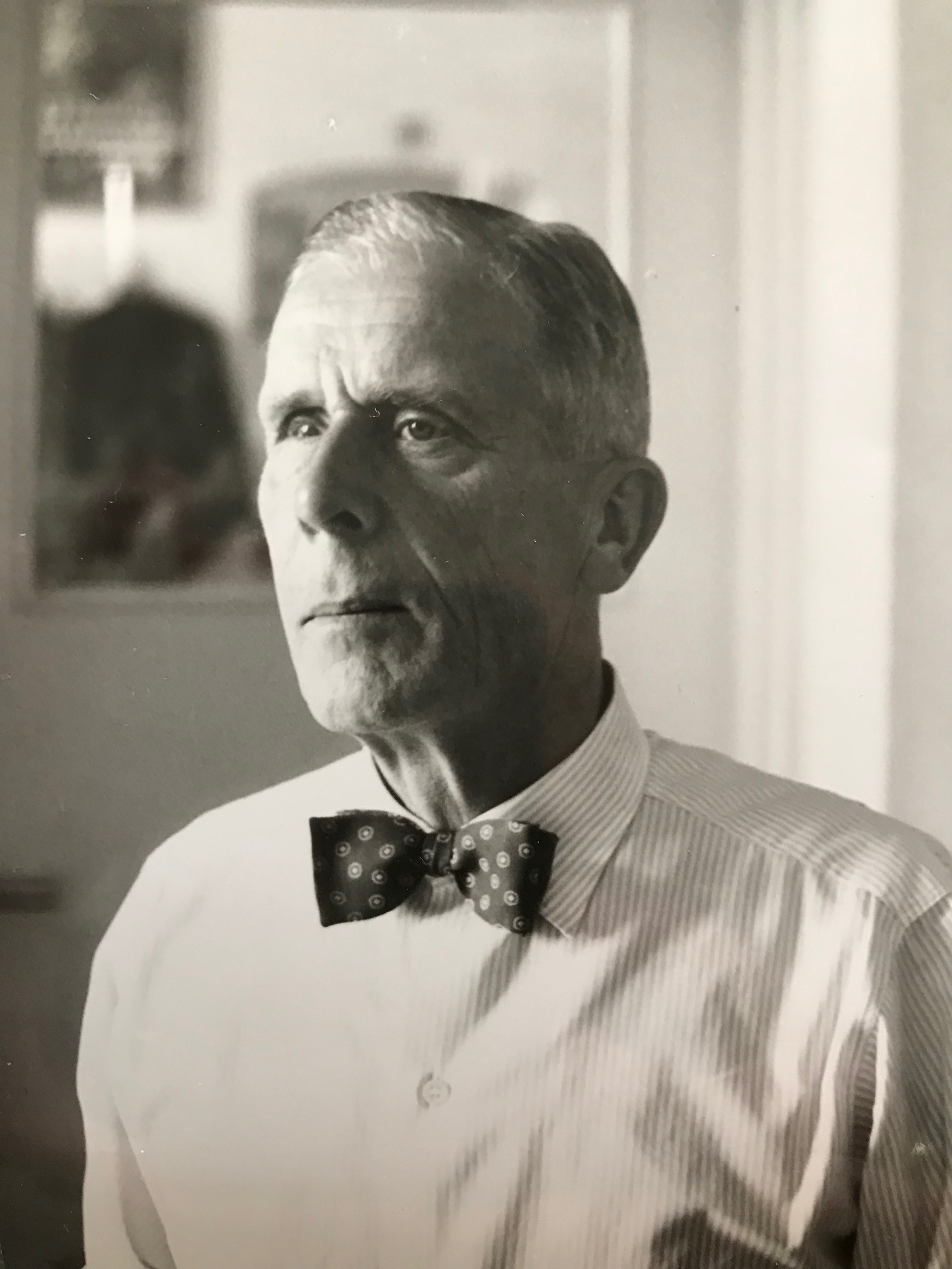 Fotografi från familjealbum tillhörande Oscar Nilssons barnbarn. Uppladdat med tillstånd från familjen.